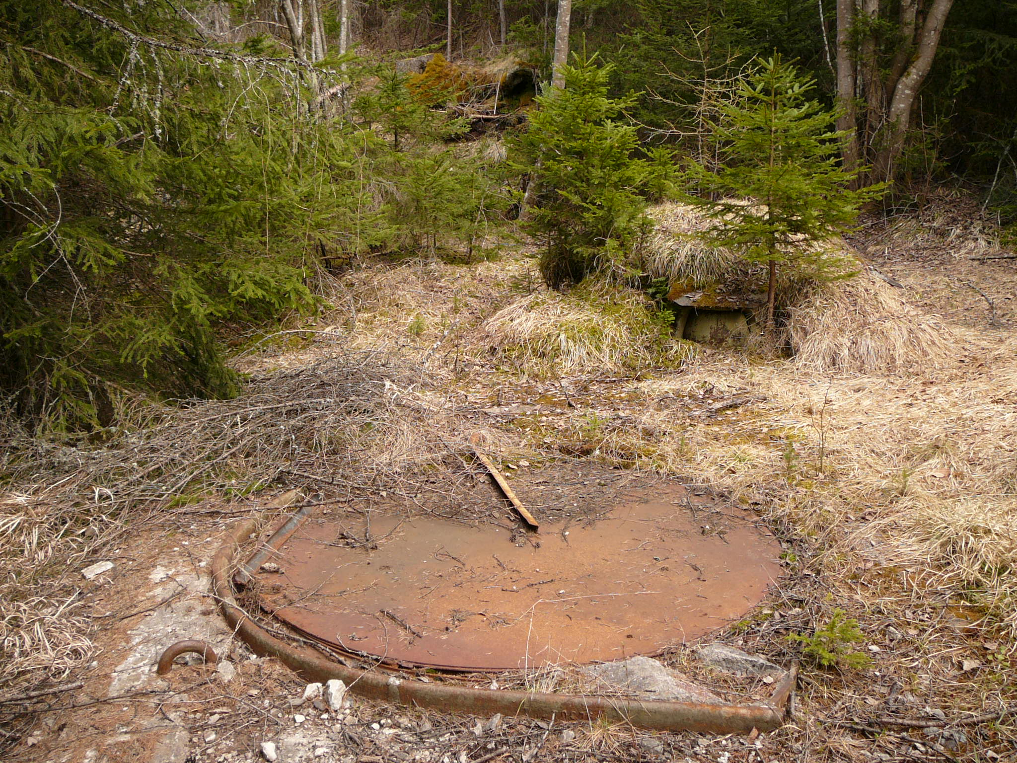 Opera 3 , sbarramento Dobbiaco